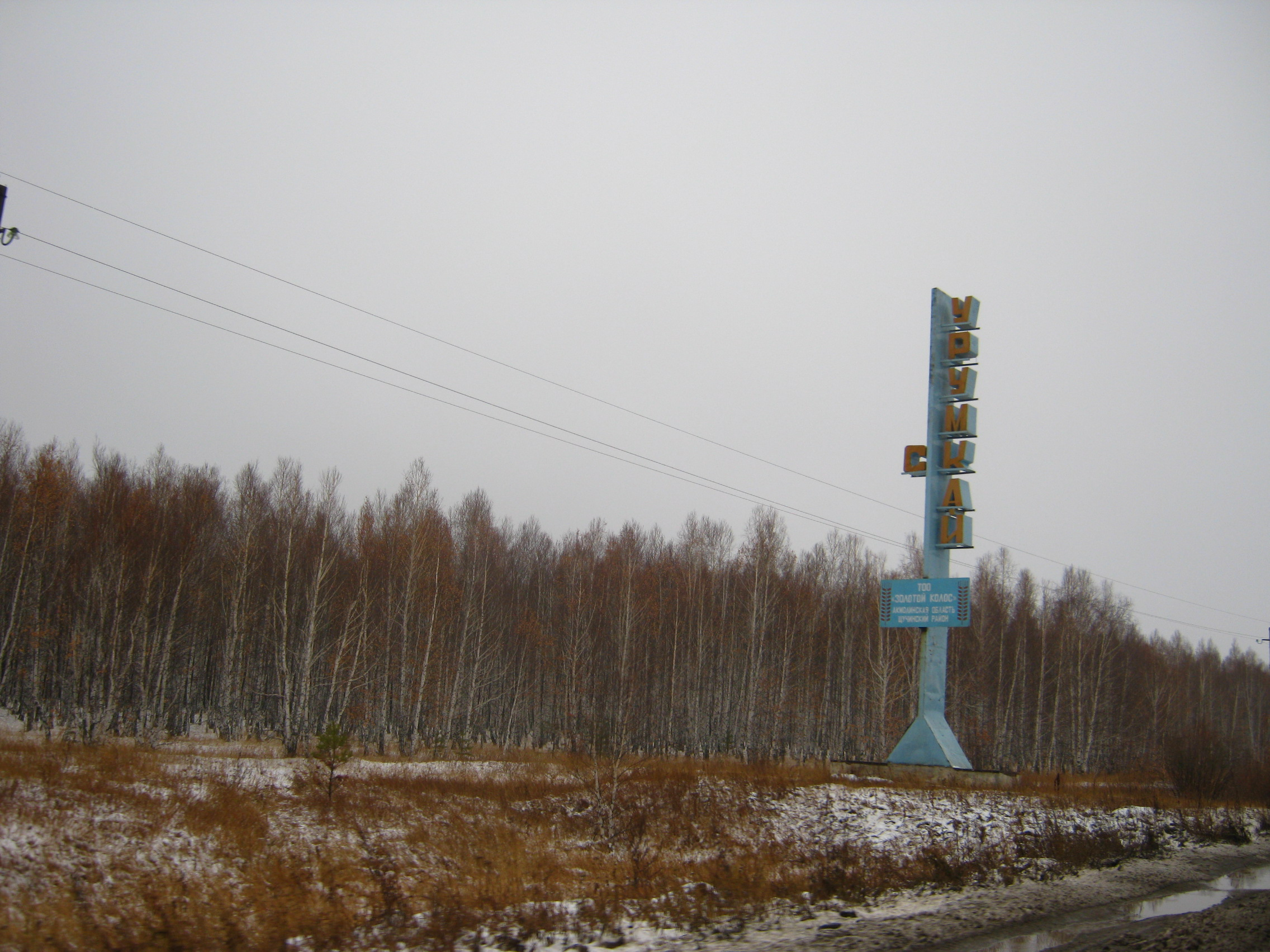 1февраля